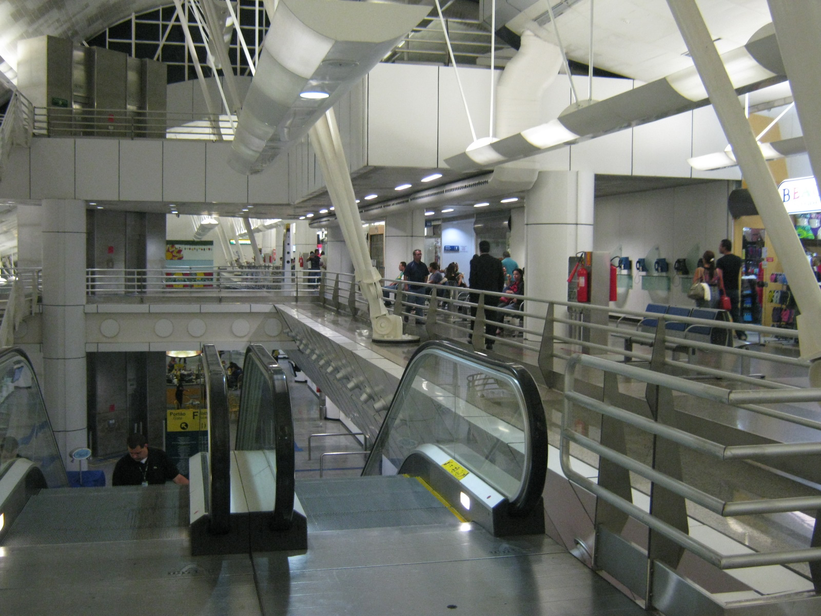 Área interna do Aeroporto Internacional Augusto Severo, Natal, Brasil.